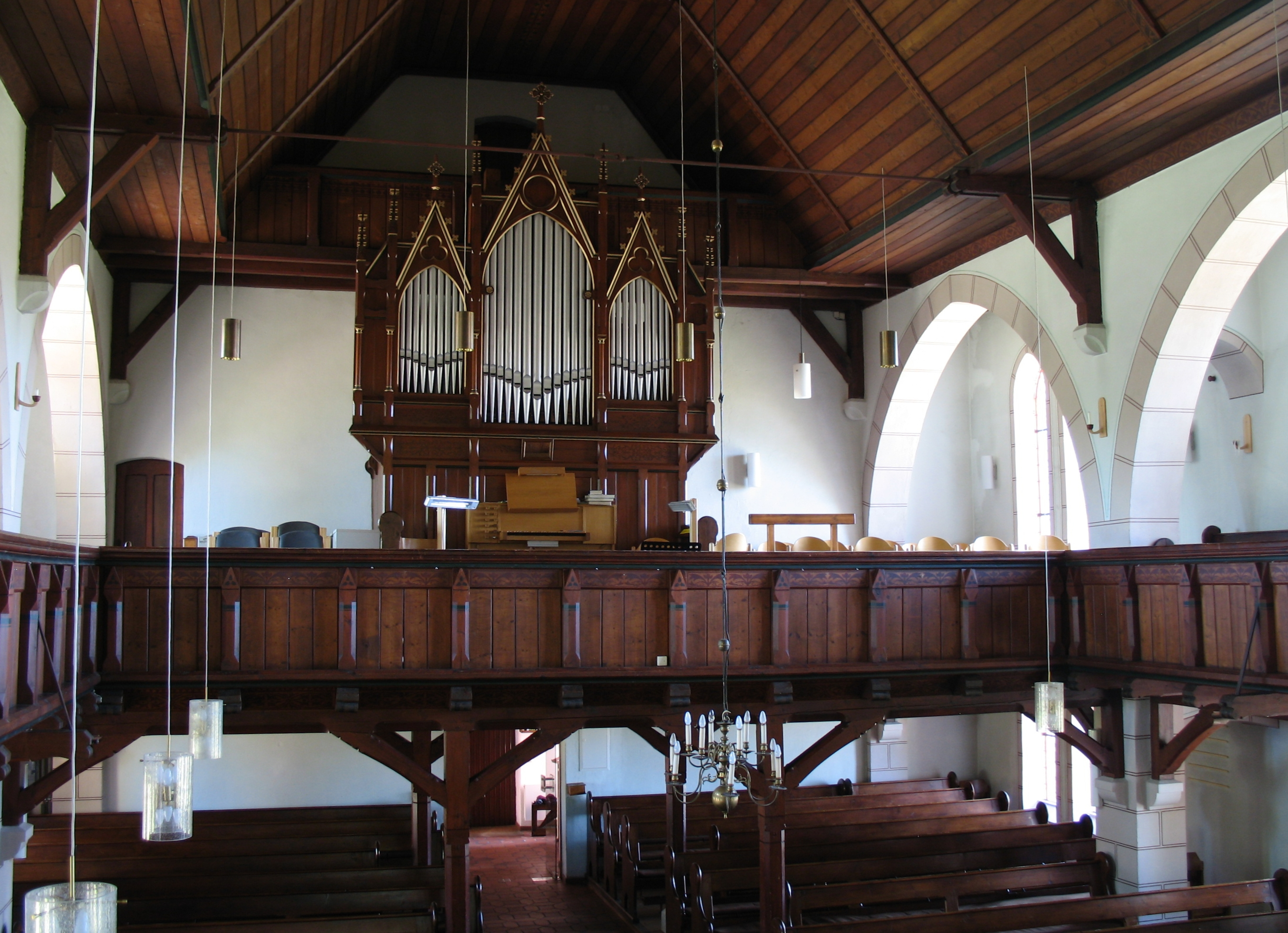 Orgel in Münkeboe (Gemeinde Südbrookmerland, Kreis Aurich, Ostfriesland, Niedersachsen, Deutschland), Evangelisch-lutherische Kirche Zum Guten Hirten